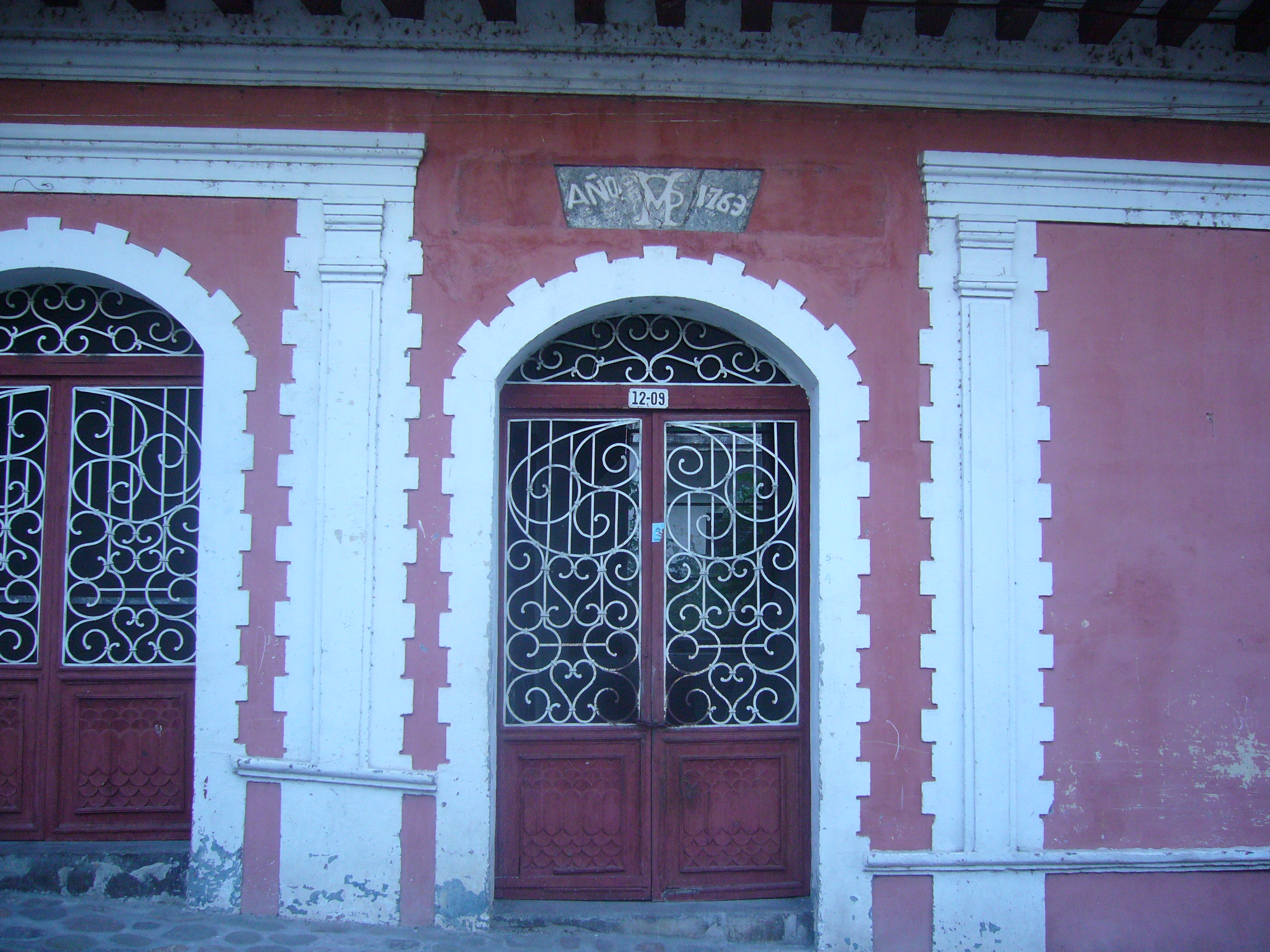 Casa Colonial de 1763 en Honda (Colombia)